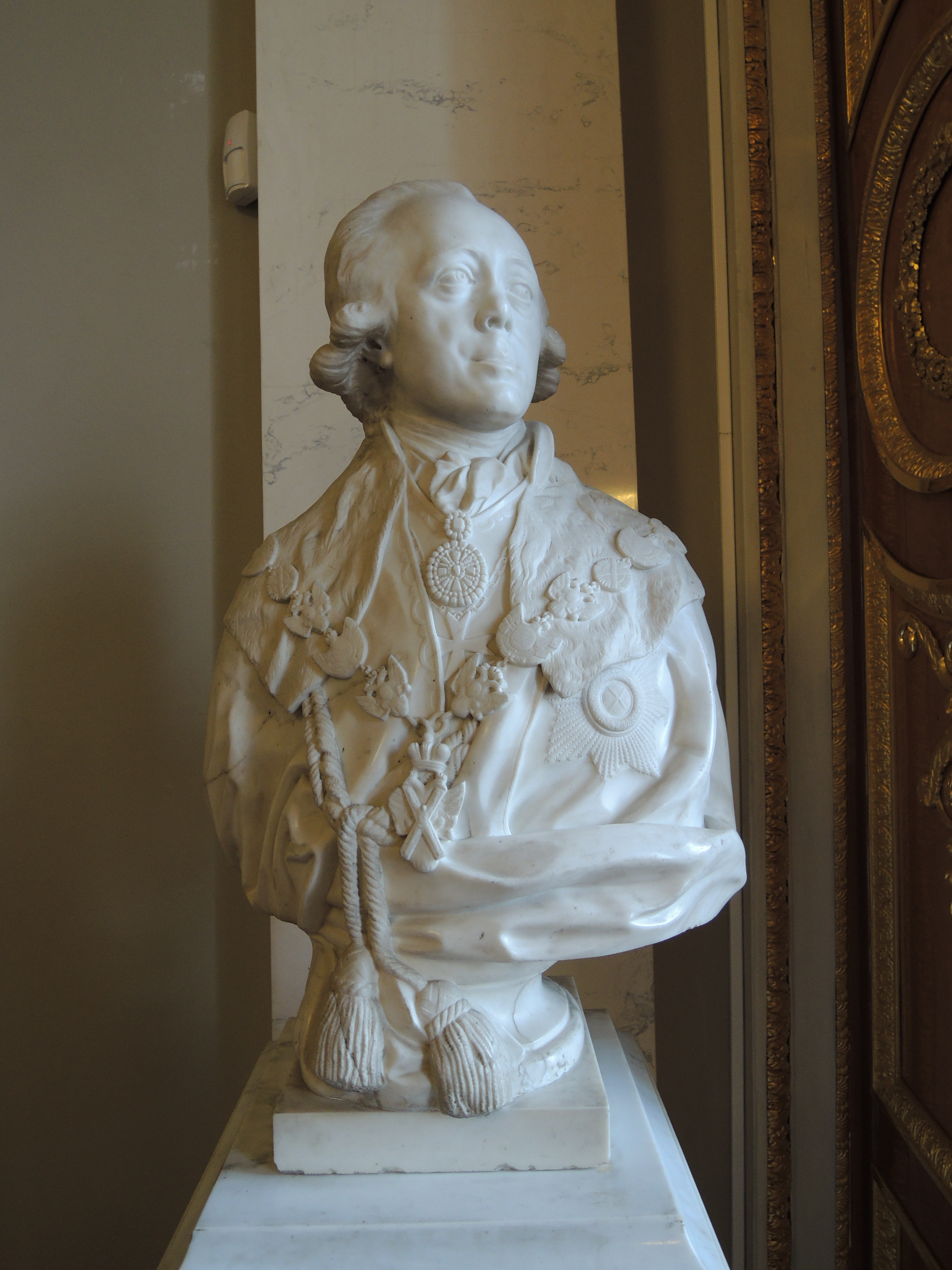 Бюст Павла I, скульптор Ф. Шубин. 1800, ГРМ